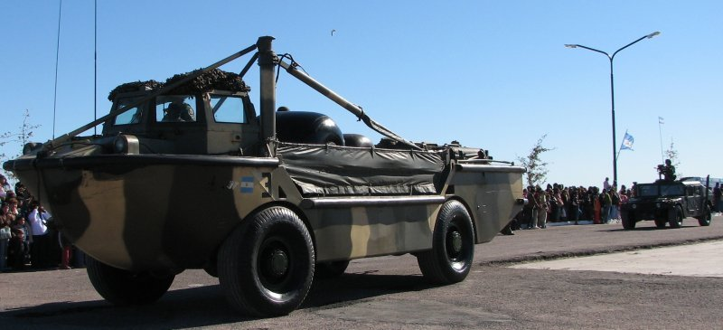 Vehículo anfibio LARC-5 y Humvee de la Infantería de Marina argentina. Conocido localmente como VAR (Vehículo Anfibio a Ruedas).